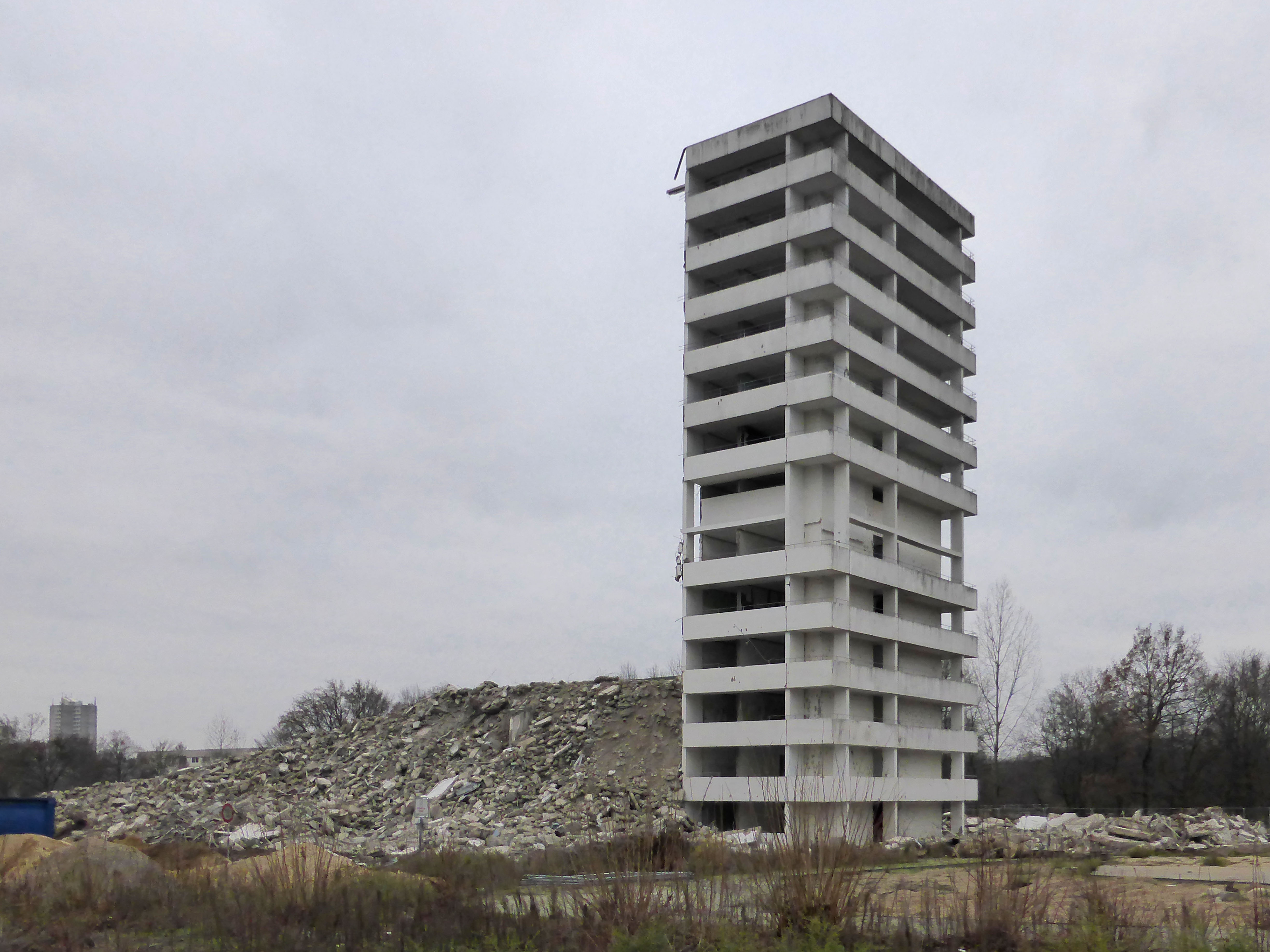 Stufenhochhaus in Wolfsburg-Detmerode im Abriss.